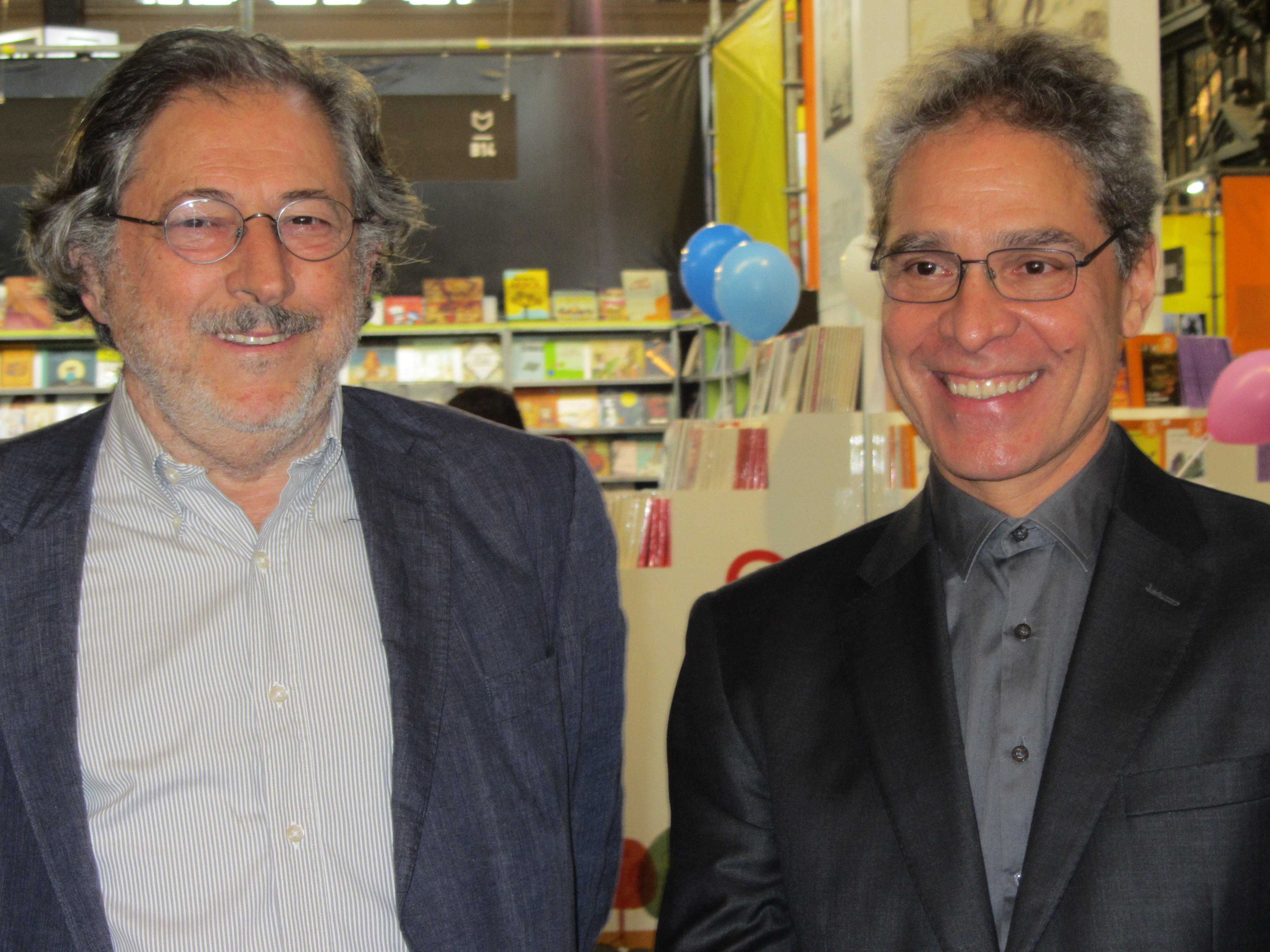 El profesor chileno Javier Pinedo con el escritor guatemalteco Rodrigo Rey Rosa durante la entrega del Premio José Donoso en la Feria Internacional del Libro de Santiago 2015